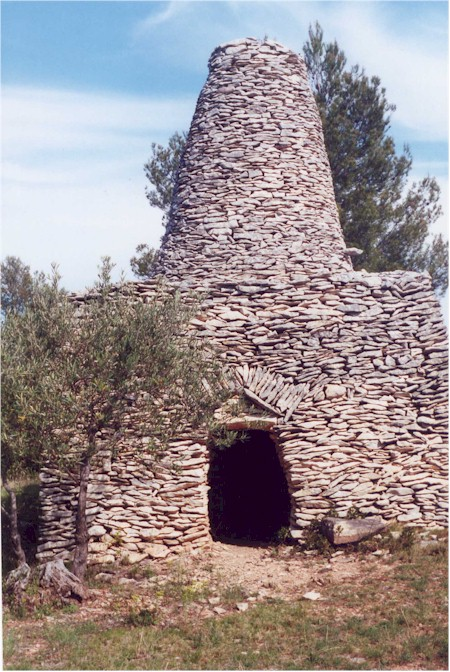 Description: Capitelle du département du Gard, France. Le cône qui la coiffe ne semble avoir qu'une fonction de signalement. Source: Hugo Soria Licence: GFDL Hugo Soria